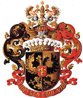 Герб графа Корфа